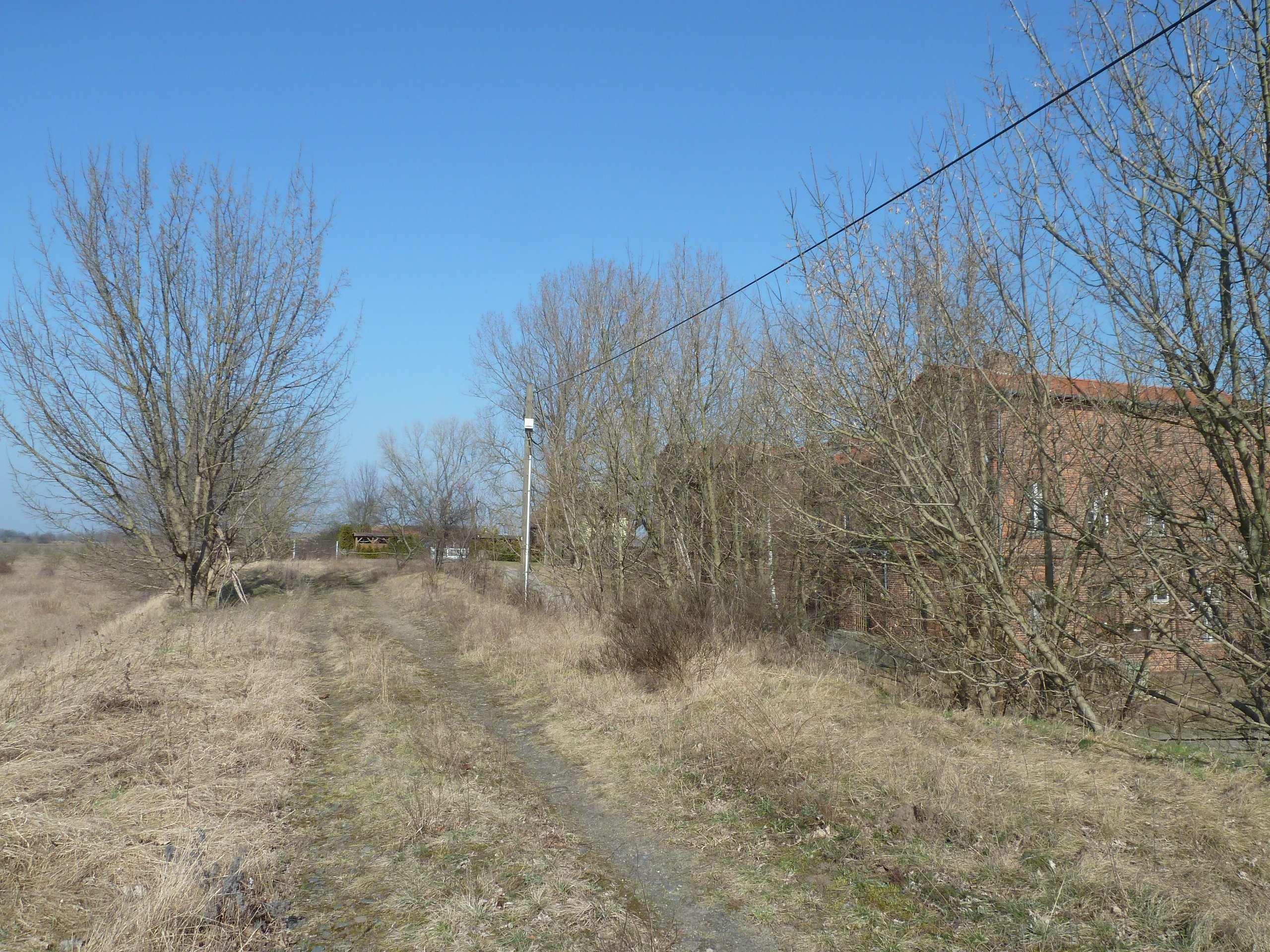 Bahnhof Großbeeren, der Bahndamm der Anhalter Vorortbahn westlich des Bahnhofsgebäudes war nur von 1943 bis 1945 in Betrieb